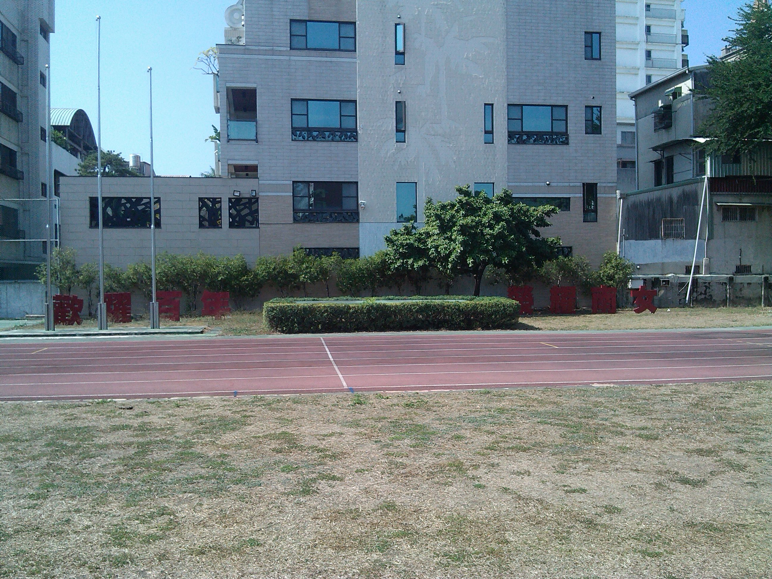 2017年 南女創校百周年的紀念飾物